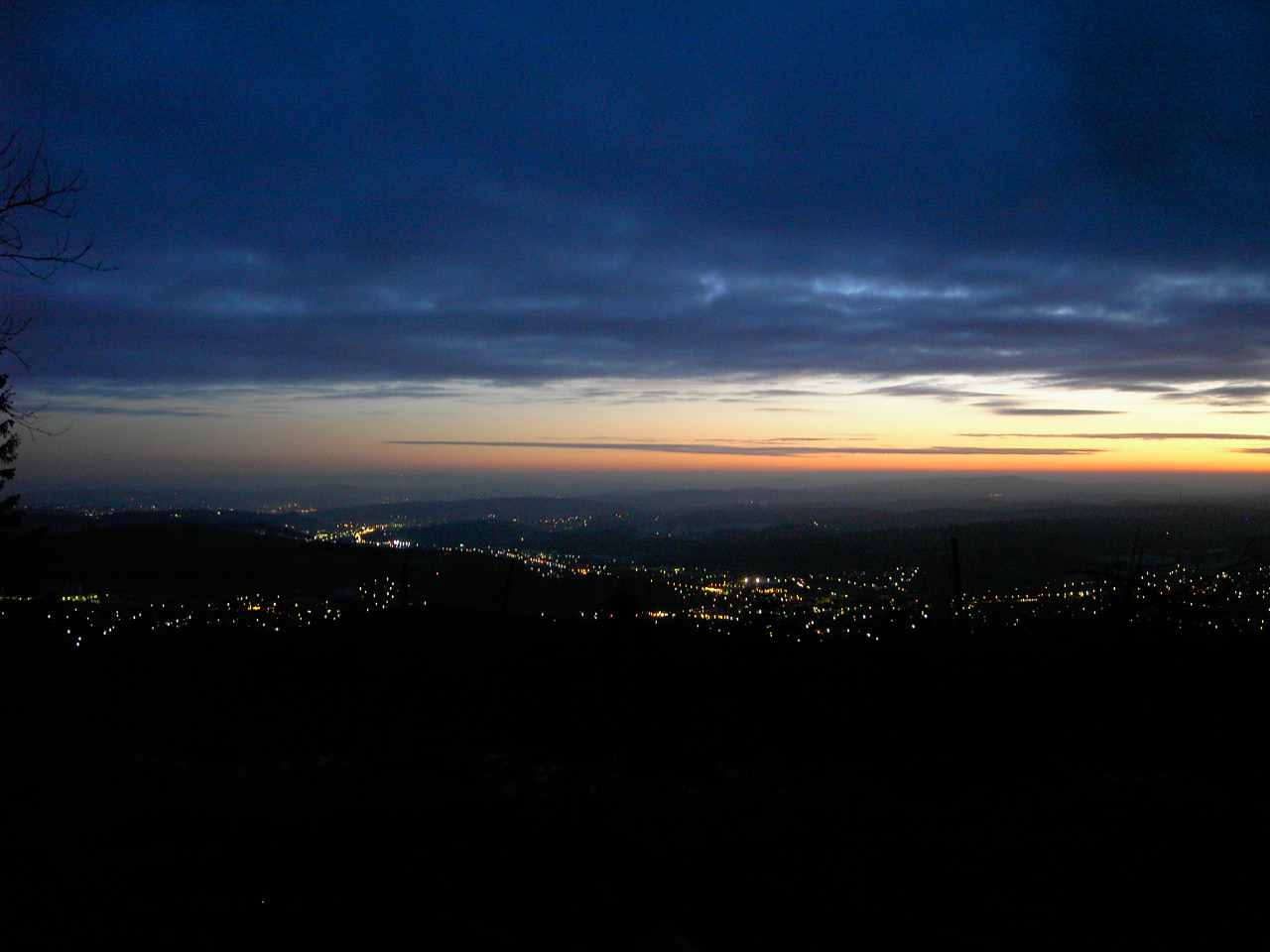 Blick vom Kindelsberg am 03.01.2009 nach dem Sturm "Kyrill"